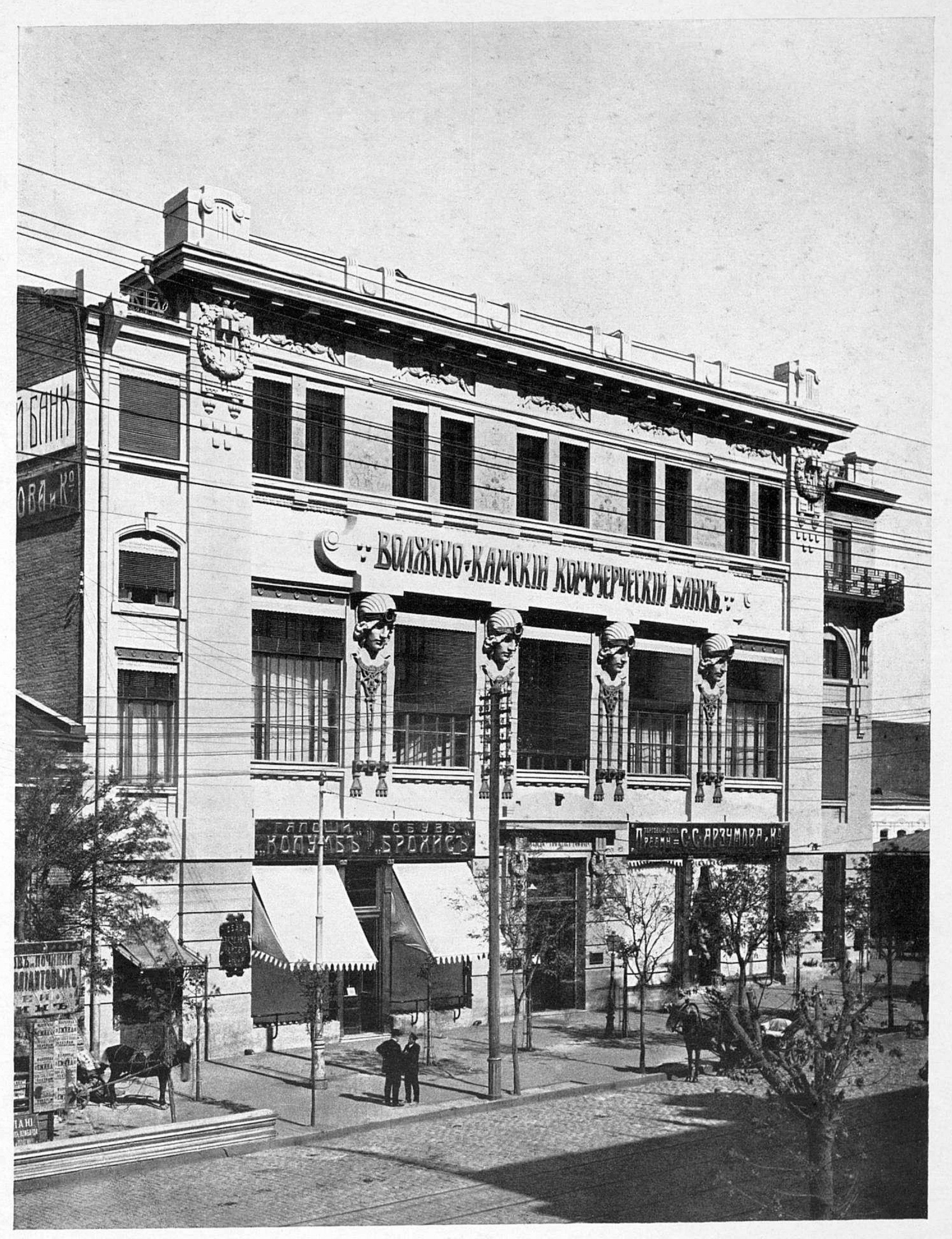 Ростовская область, Волжско-Камский банк. 1909